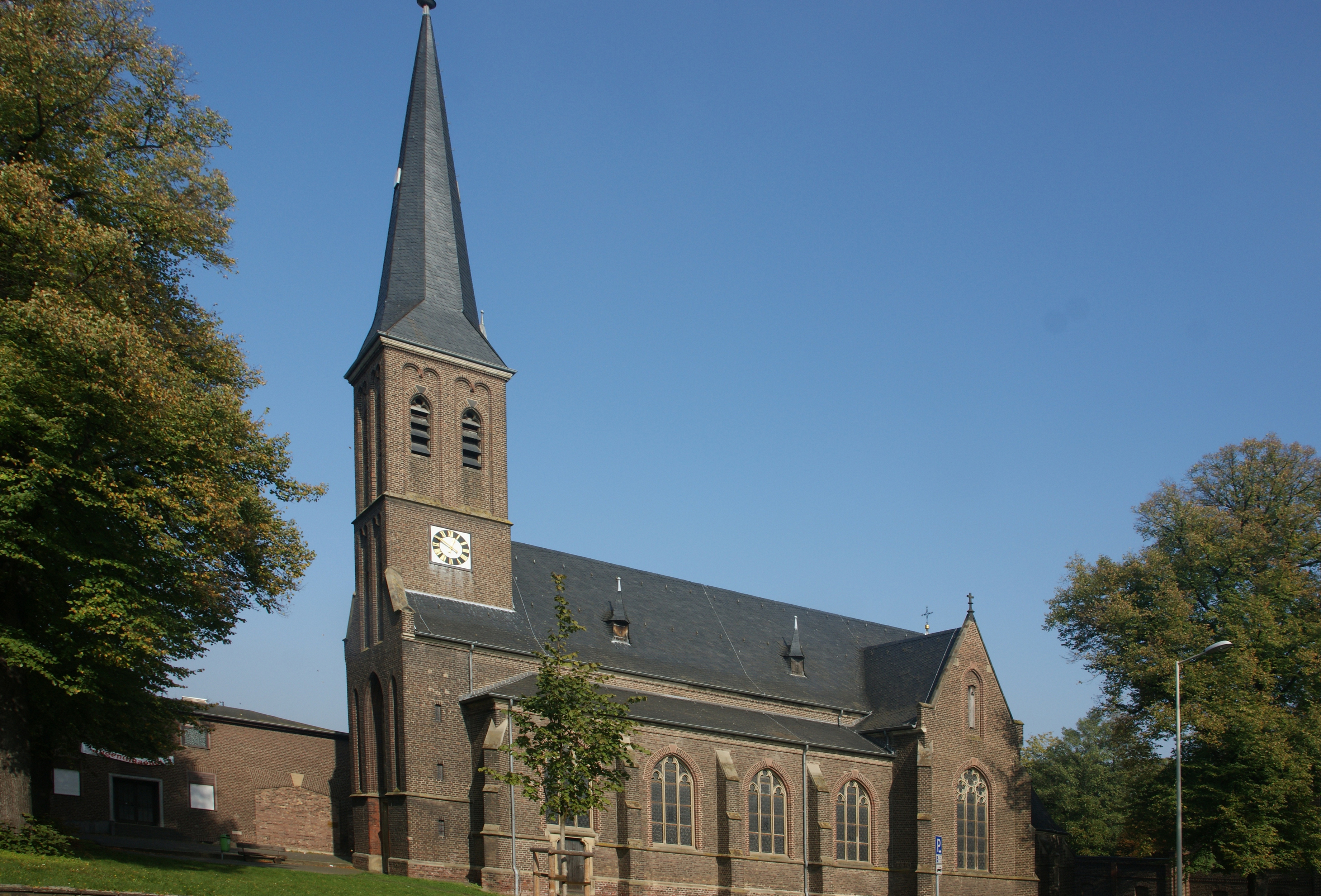 Katholische Kirche St. Sebastianus in Königsdorf